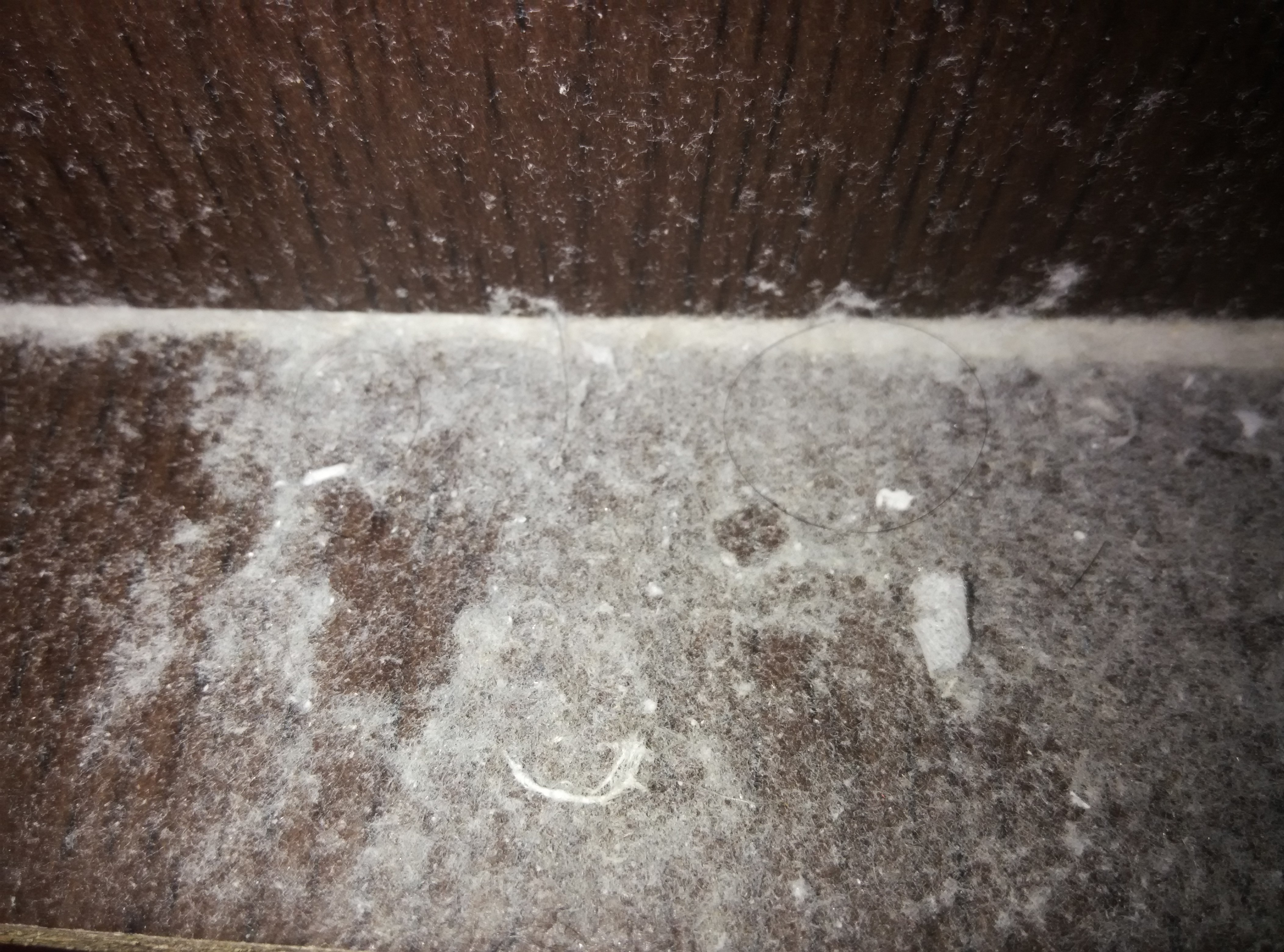 中文（香港）: Dust on a wooden bookshelf